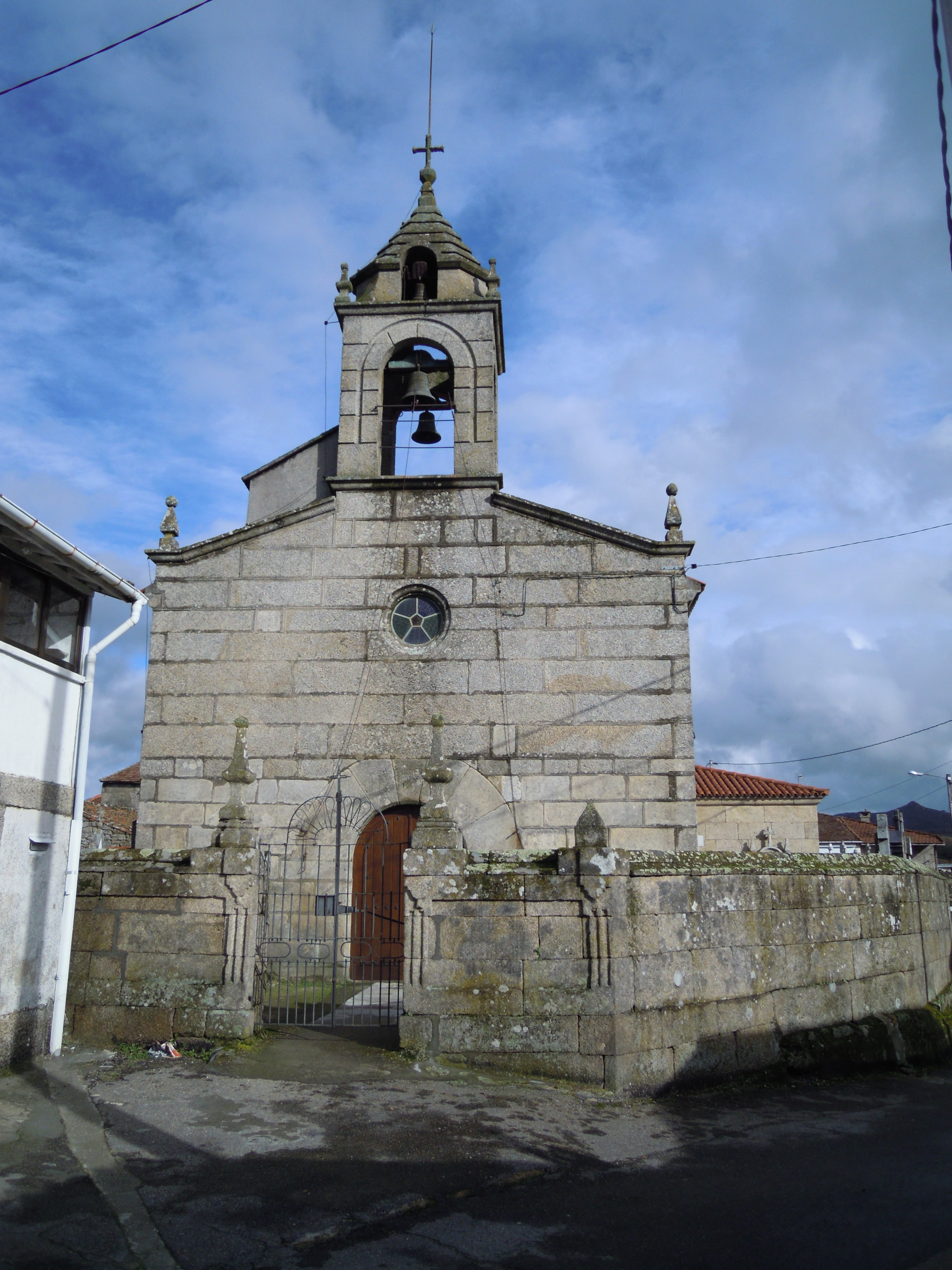 Igrexa de Vila de Rei (Trasmiras).